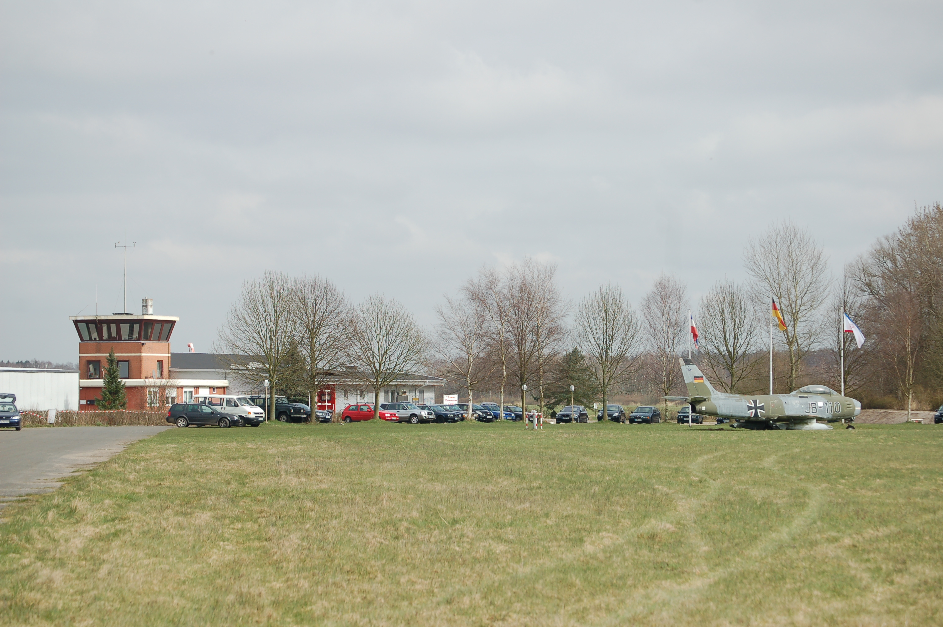 Der Eingangsbereich des Flugplatzes Uetersen.